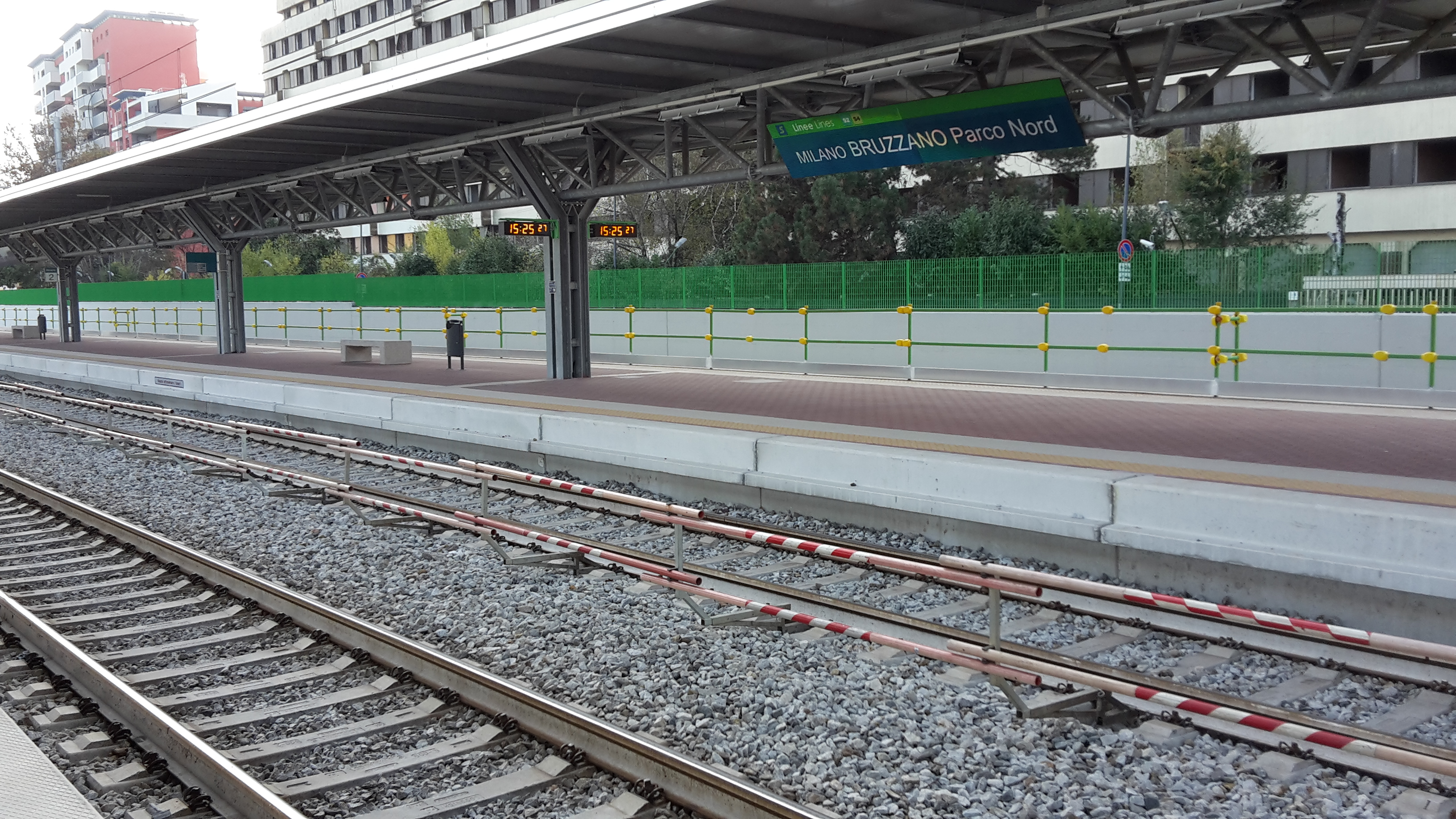 I binari della stazione di Milano Nord Bruzzano.